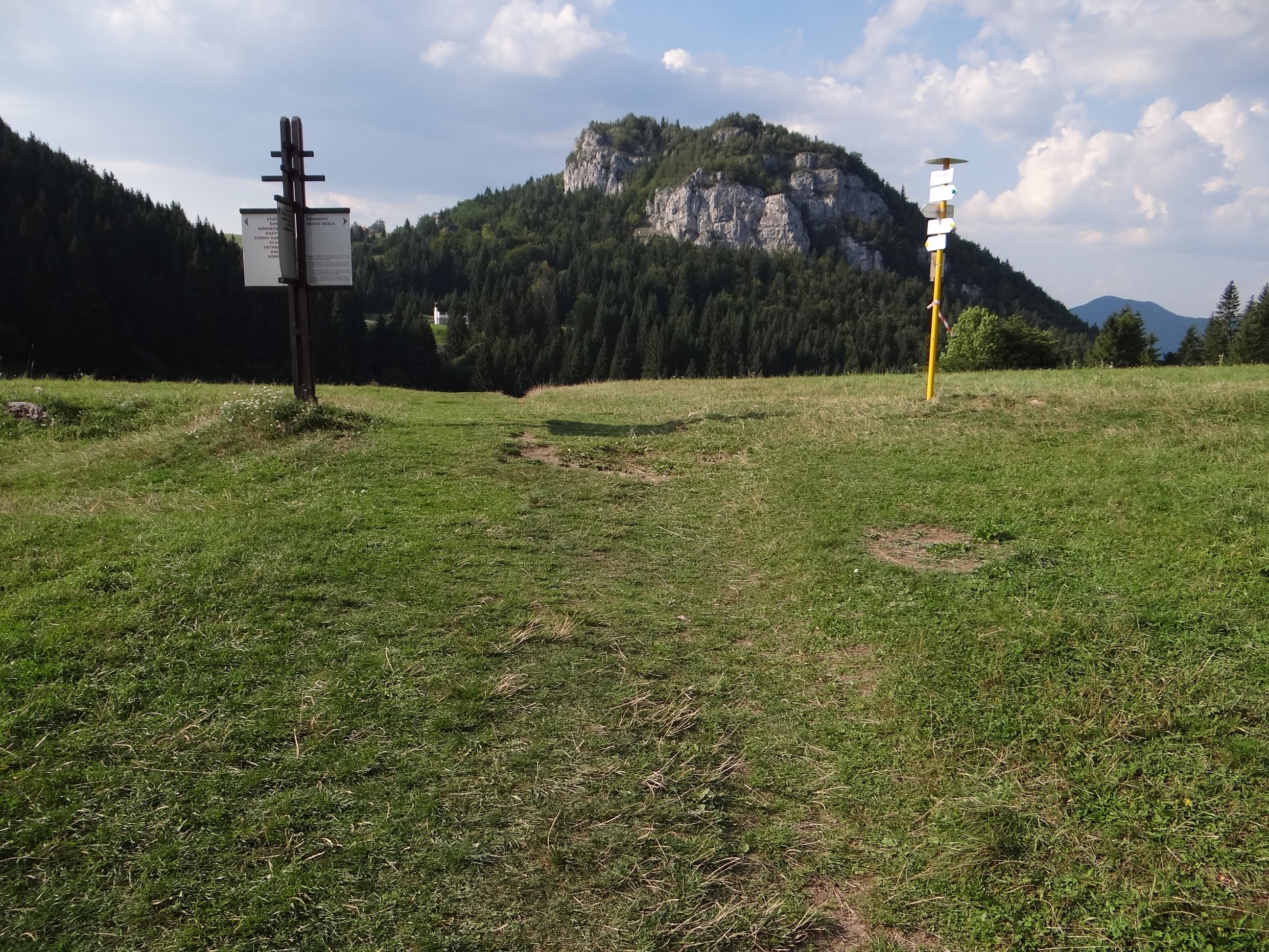 Pod Sidorovom, skała Malina